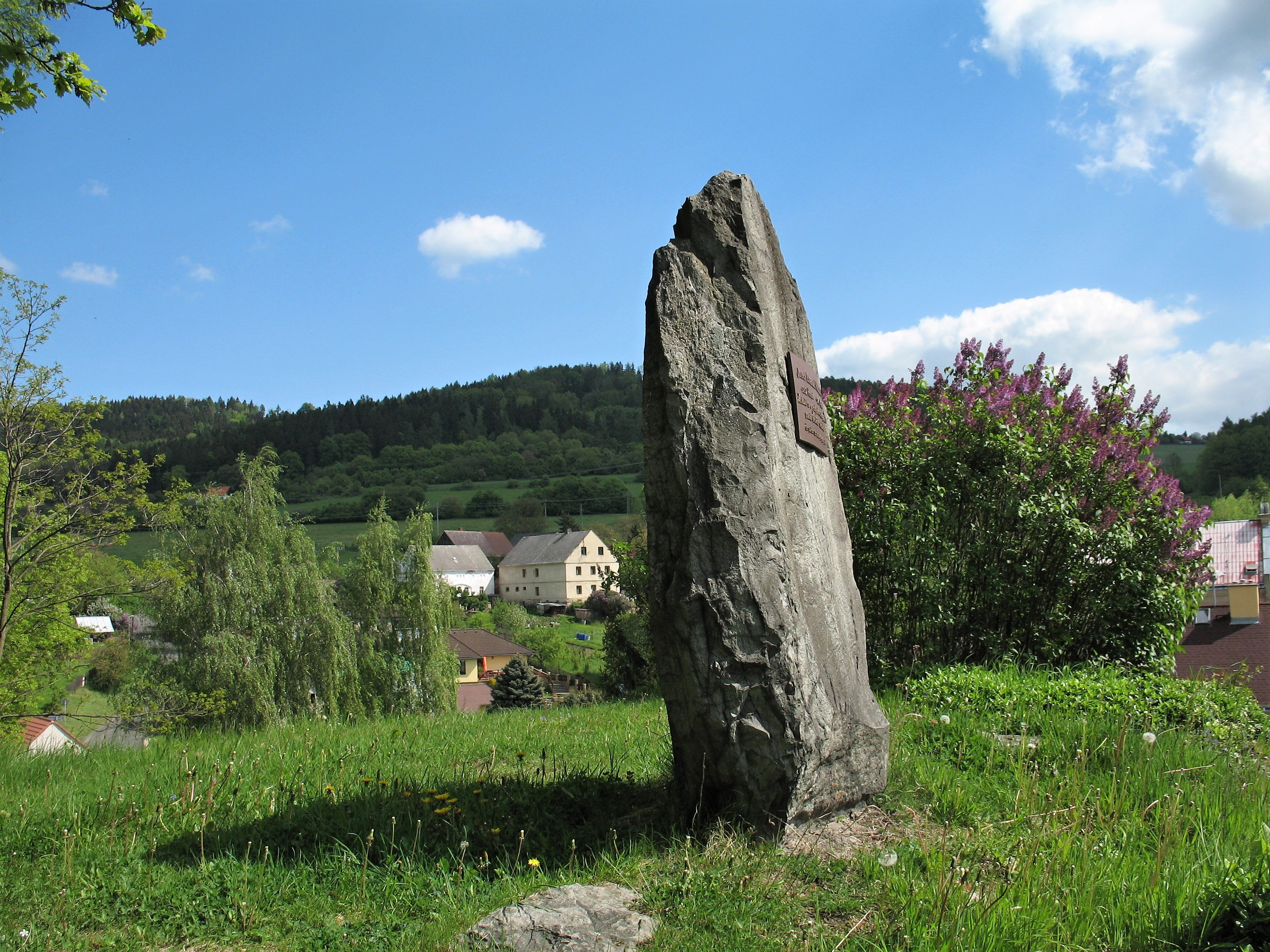 Pomník J. E. Hibsche na kostelním návrší v Homoli u Panny